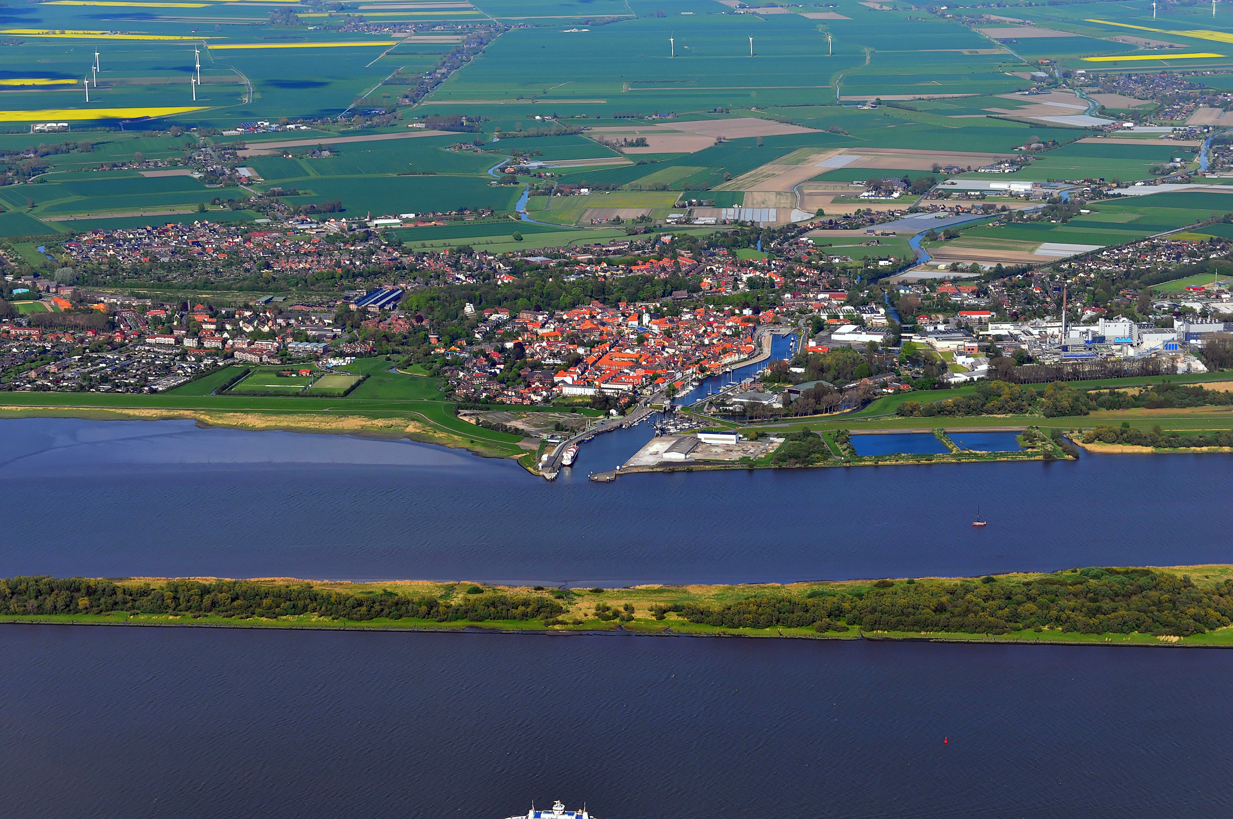 Luftbilder von der Nordseeküste 2012-05